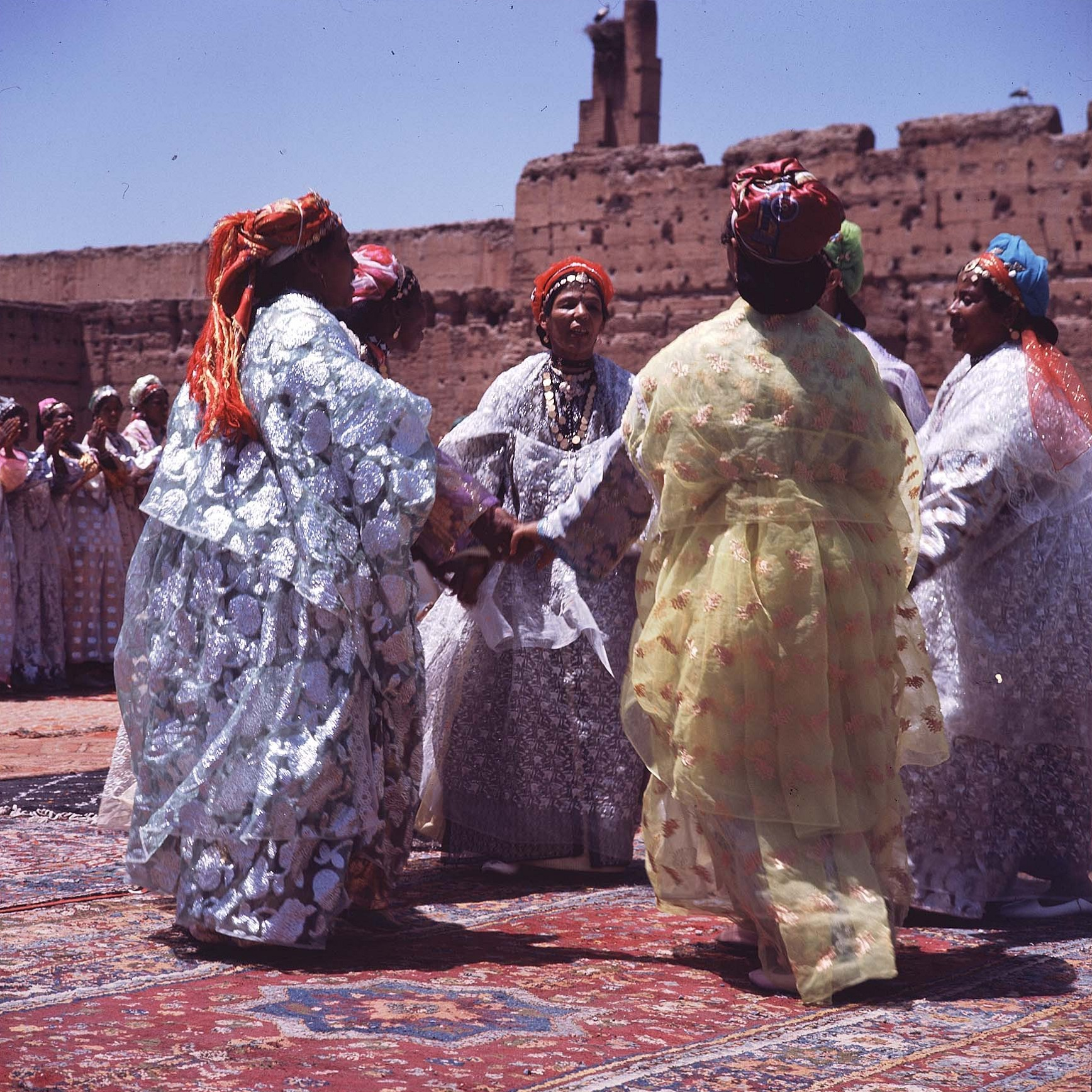 De dansgroep op de foto voert een Ahwash-dans uit Ouarzazate uit.